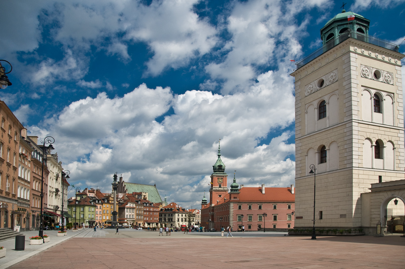 Dzwonnica Kościoła św. Anny w Warszawie